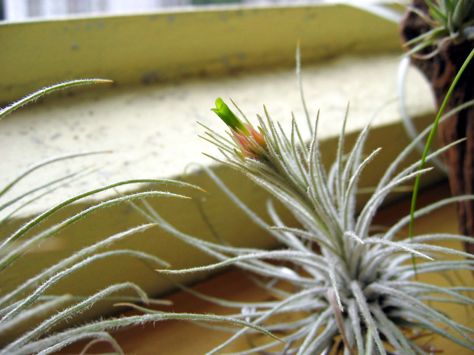 Tillandsia plumosa